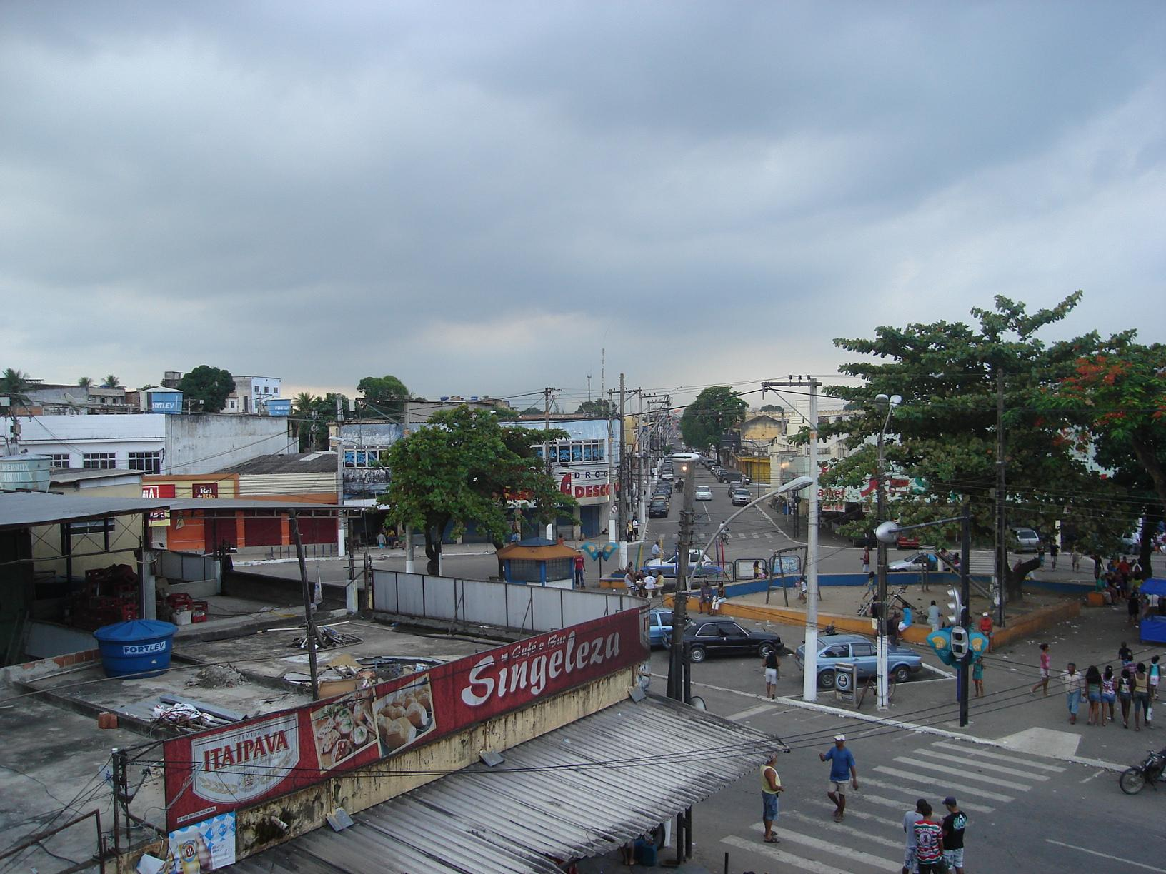 Saracuruna.